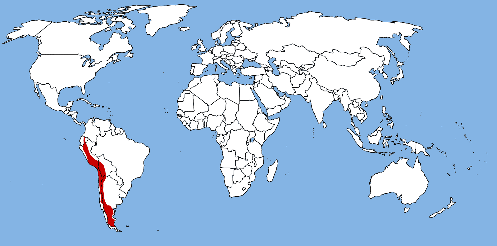 Pseudalopex culpaeus (Culpeo, Andes Fox, Andes Jackal)